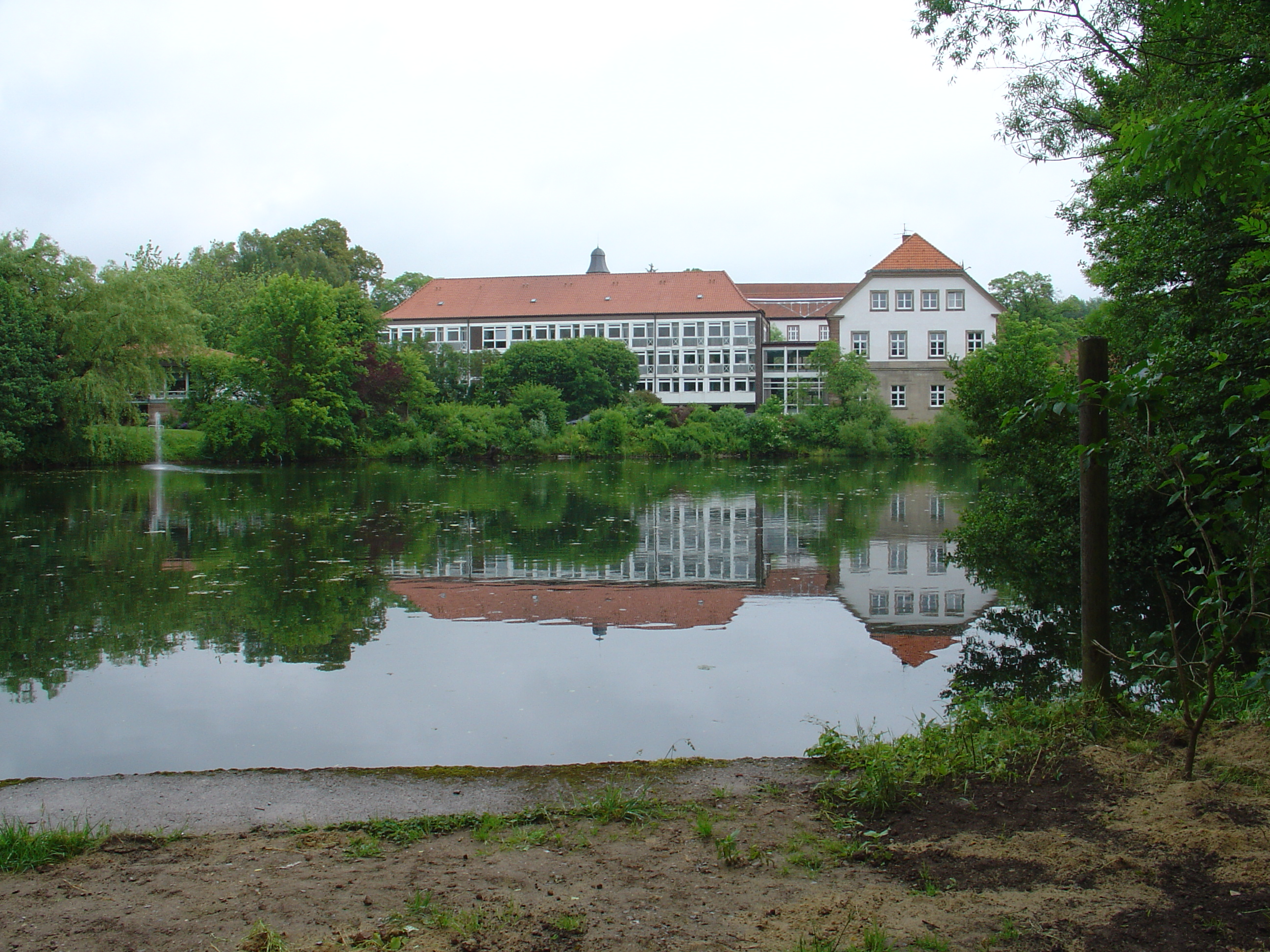 Ansicht des Klosters Hardehausen